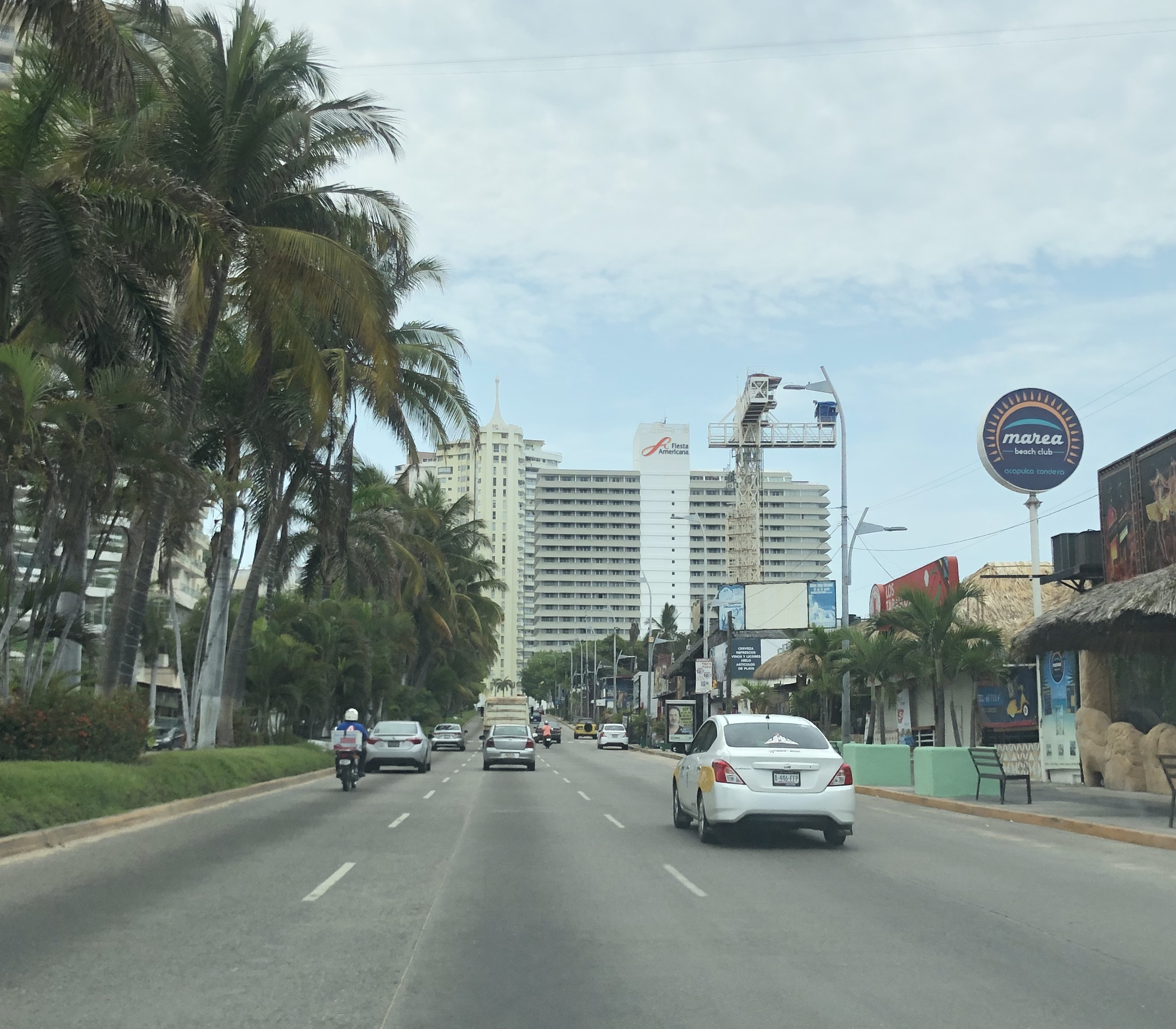 Costera Miguel Alemán Acapulco